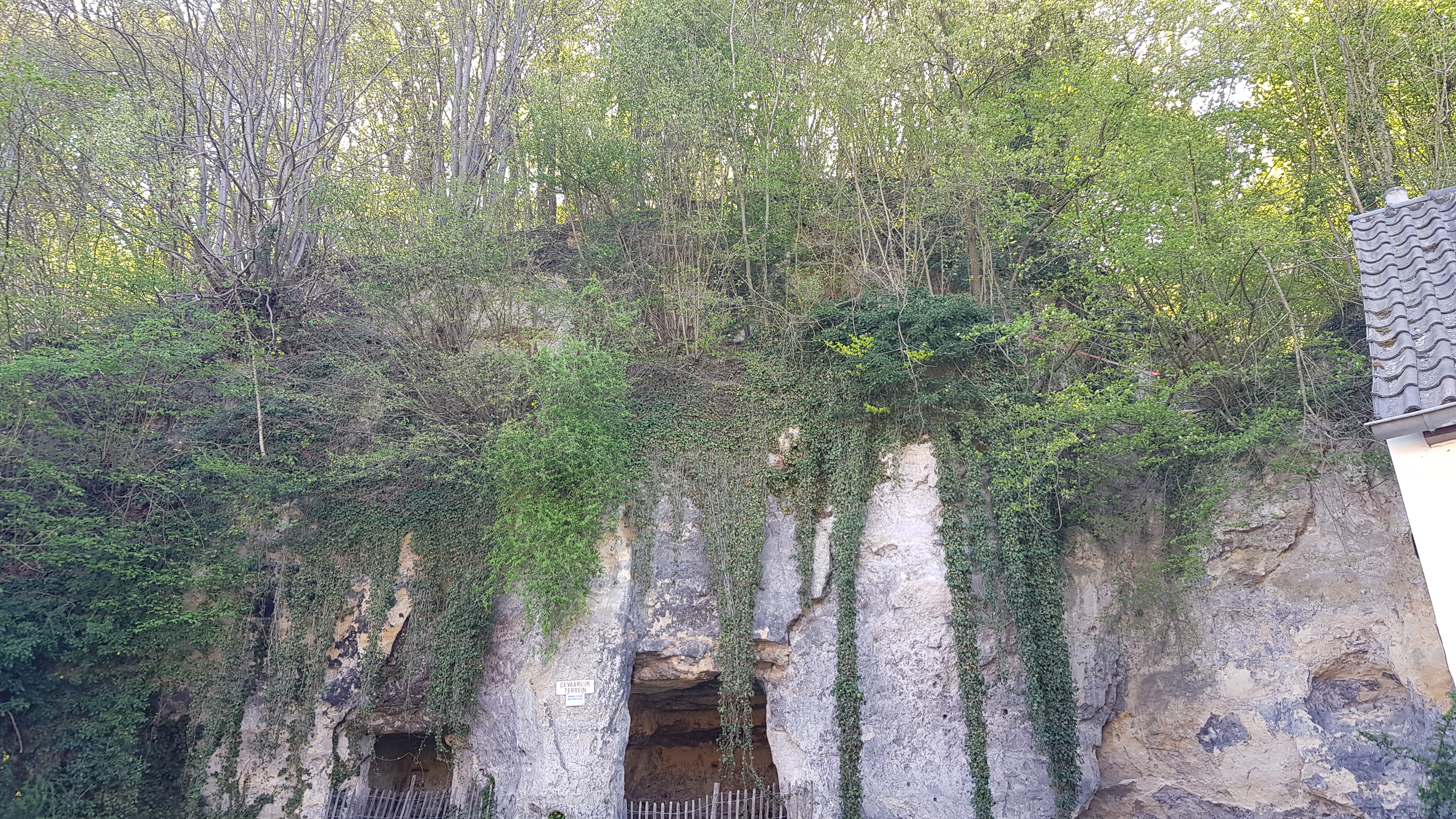 Leeraarsgroeve boven in het groen (de grote gaten eronder zijn van de Groeve onder de Leeraarsgroeve), Geulhem, Nederland